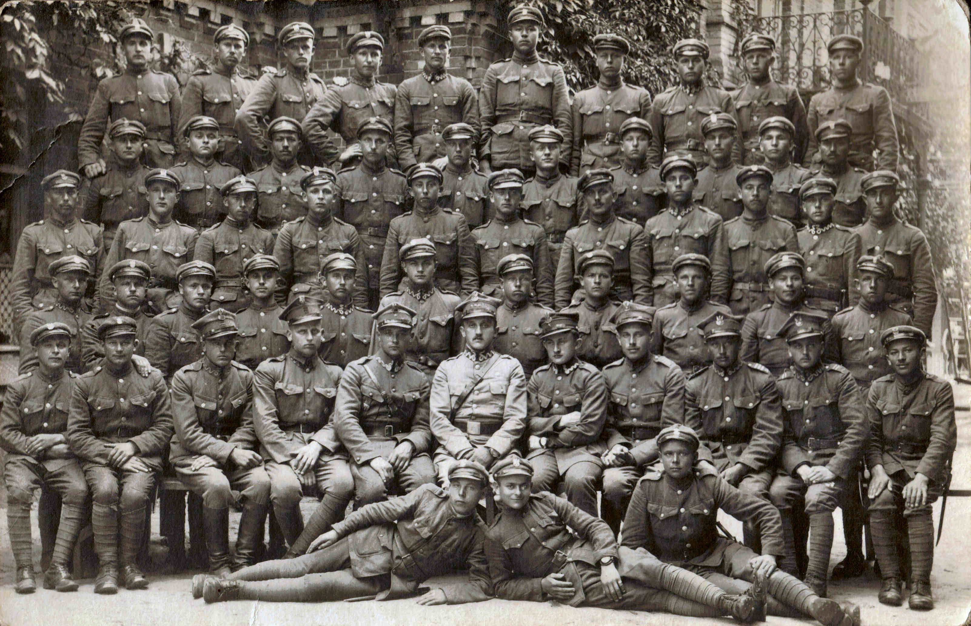 Szkoła podoficerska Batalionu zapasowego 22. Pułku piechoty w Siedlcach. Wiosna 1920 roku. W środku, w jaśniejszym mundurze, siedzi Dowódca batalionu zapasowego kpt. Wacław Kostek-Biernacki. Drugi po prawej od dowódcy batalionu siedzi plut. Wincenty Kobyliński, Szef Szkoły podoficerskiej.